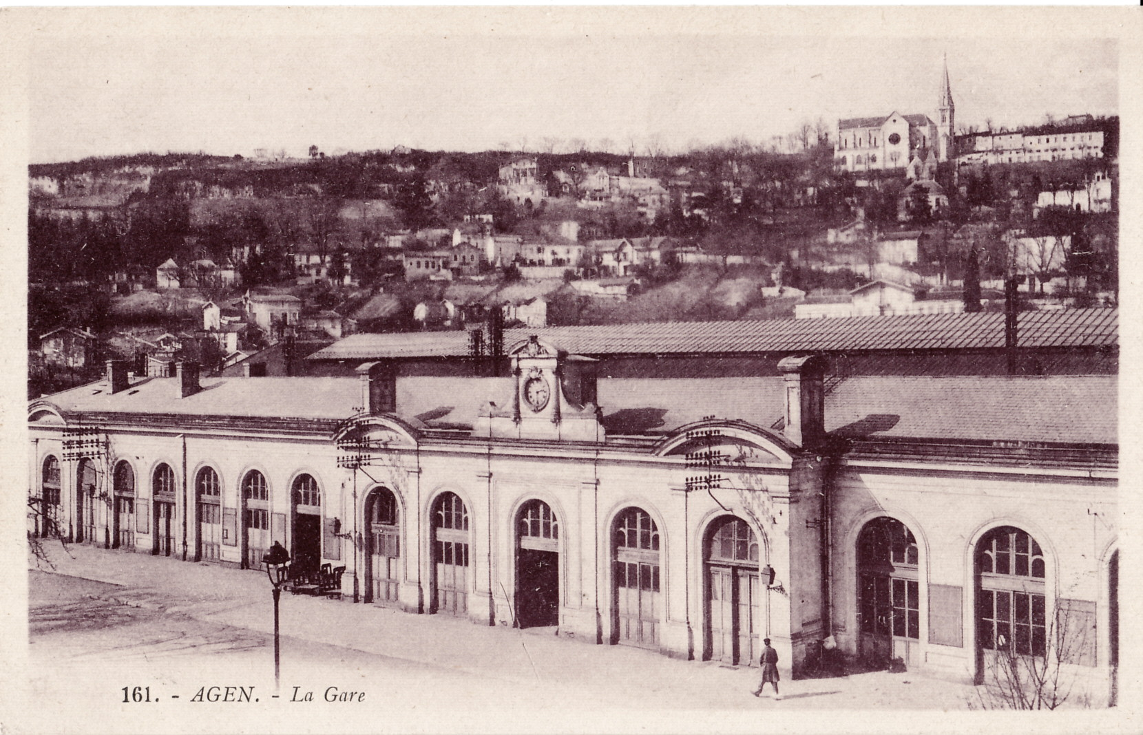 Carte postale ancienne éditée par Artaud à Nantes, n°161 : AGEN - La Gare